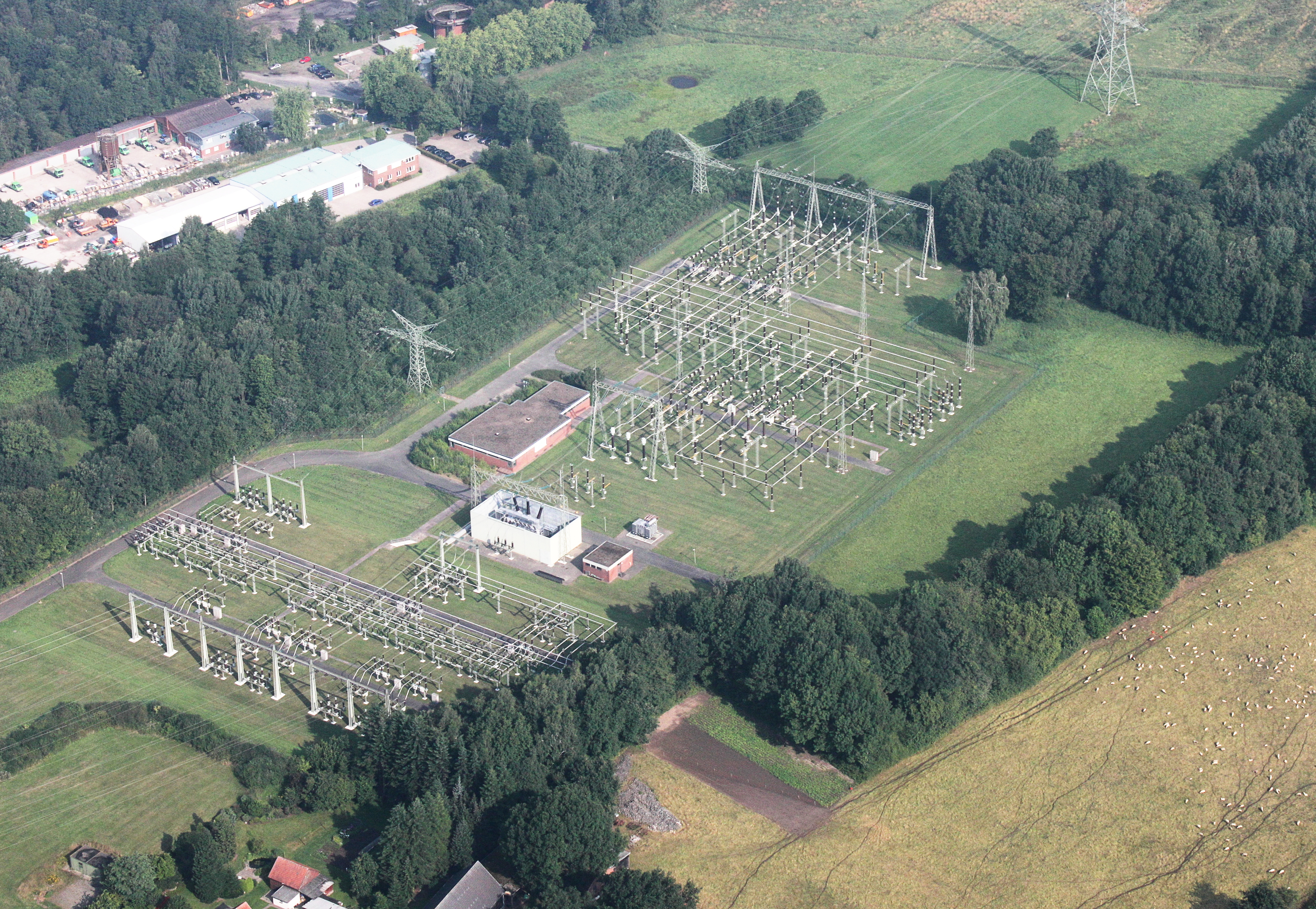 Flug über Ganderkesee; Umspannwerk Ganderkesee